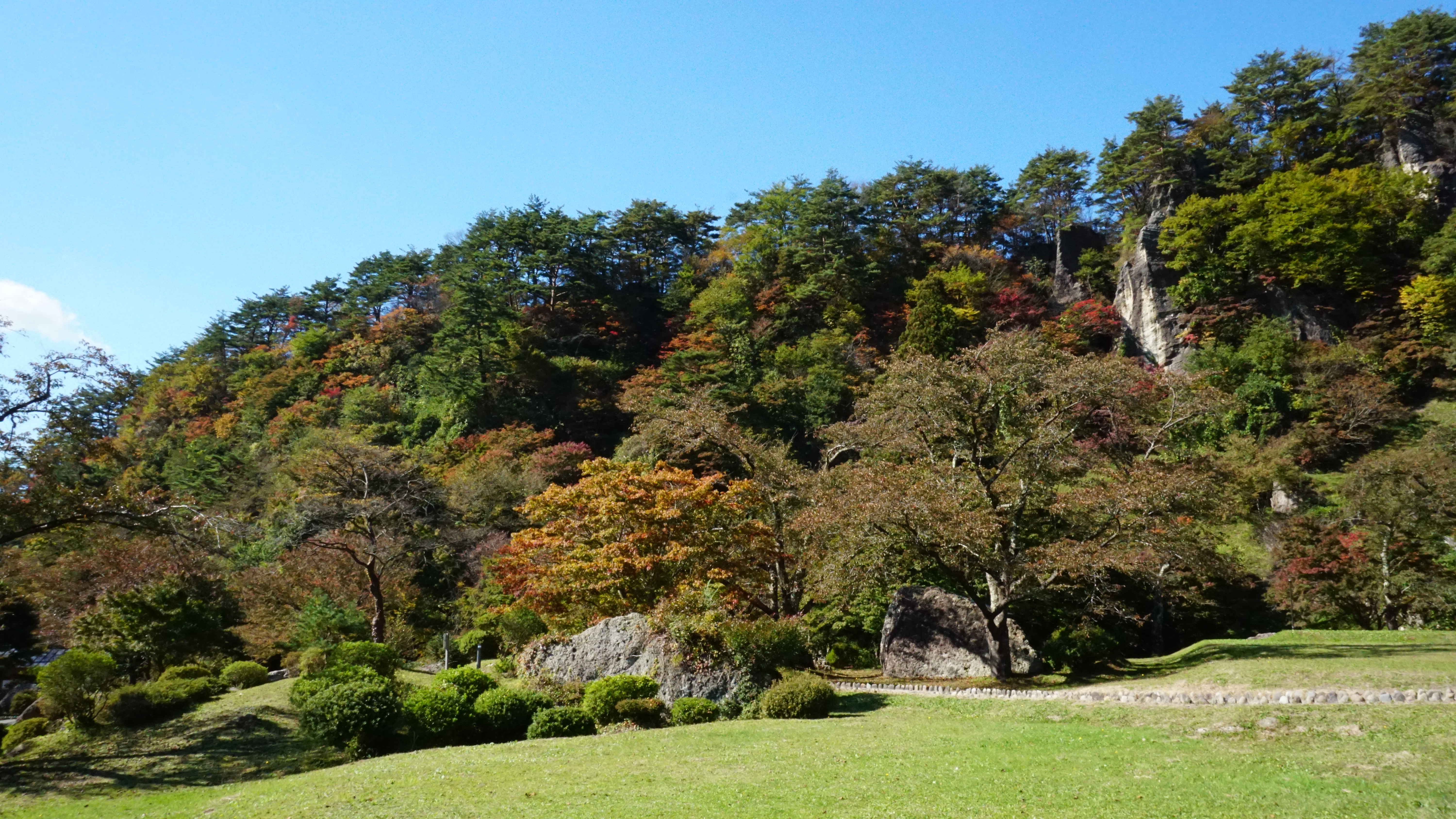 きみまち阪の紅葉